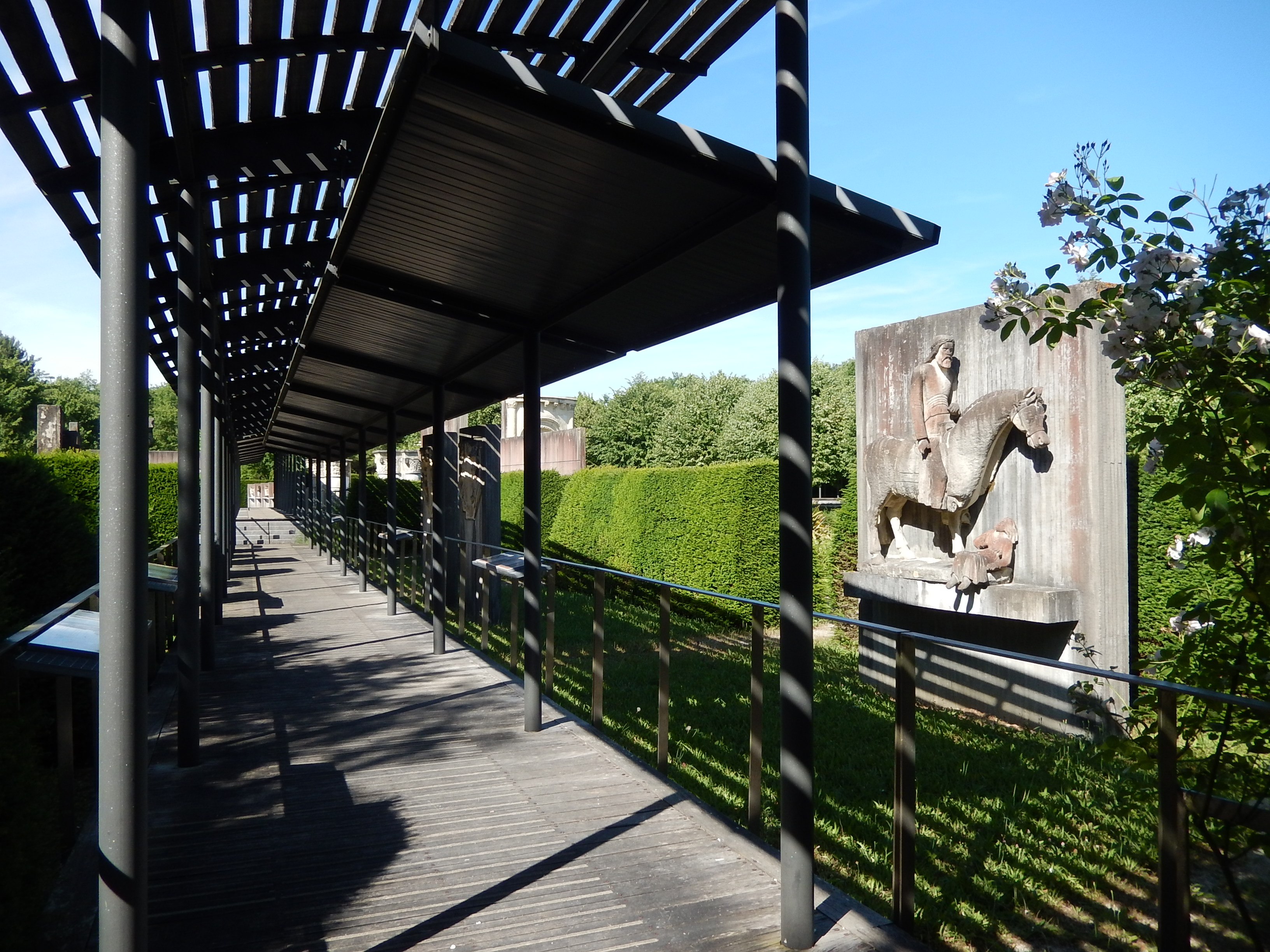 Une allée du jardin de sculpture romane, au bord de l'autoroute A10, à Lozay.